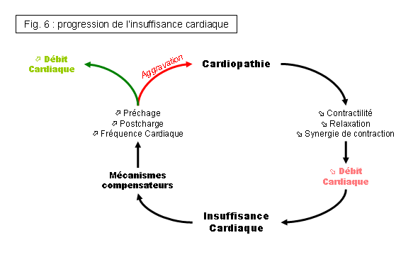 Cercle vicieux de l'insuffisance cardiaque